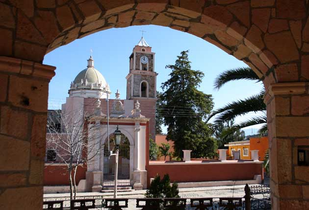 foto tomada en la plaza desde el quiosko